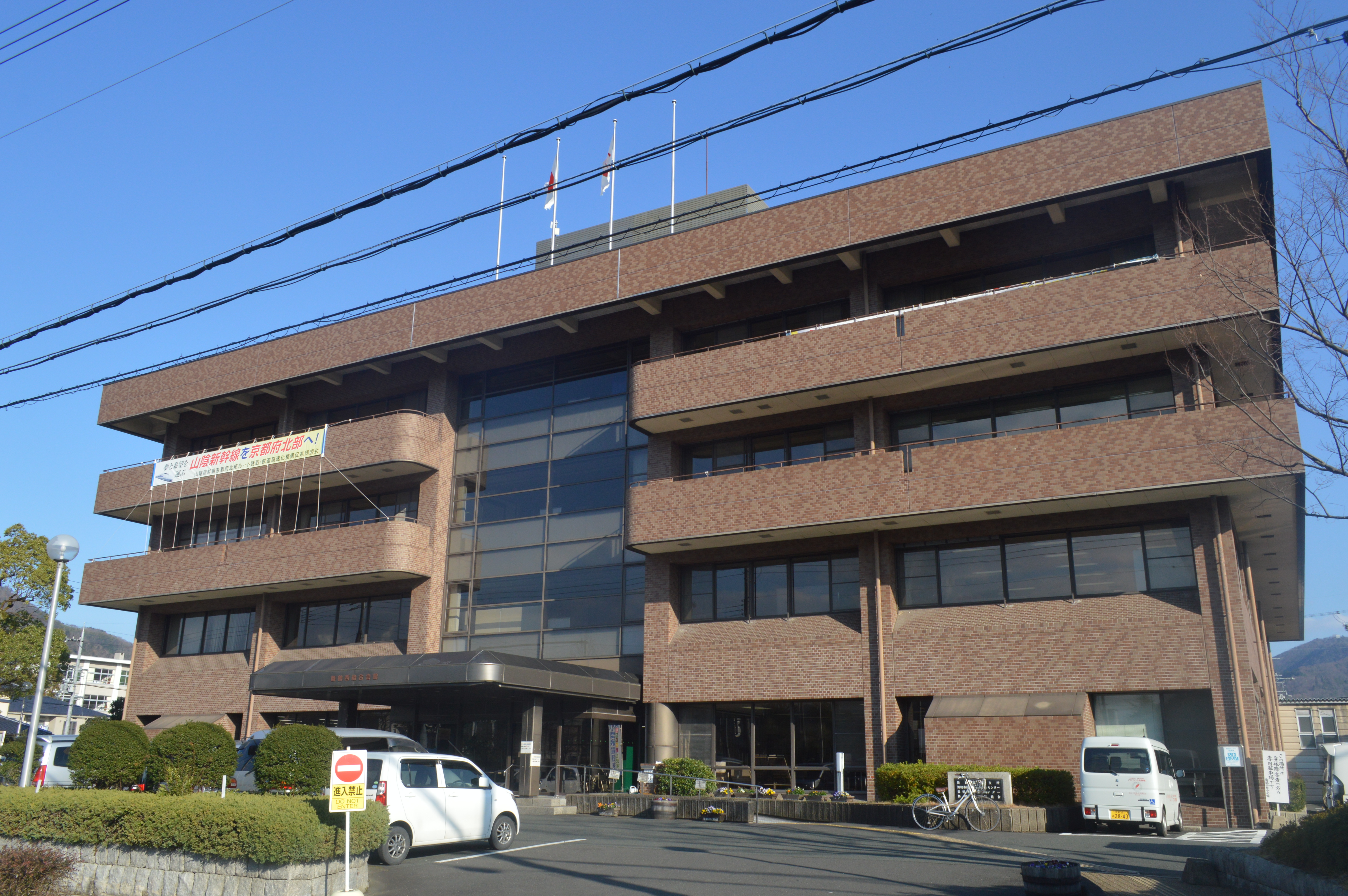 京都府舞鶴市にある舞鶴西総合会館。舞鶴市役所西支所、舞鶴市郷土資料館などが入っている。